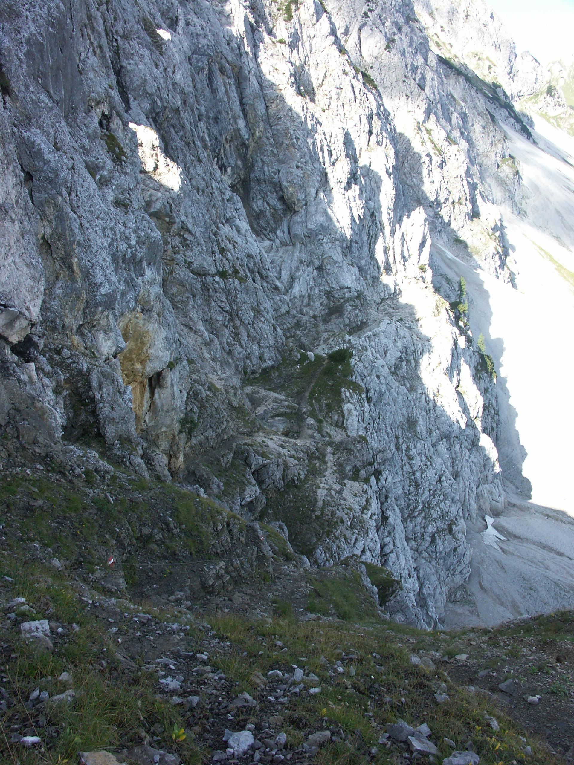 Climbing_Klettersteig_Alps_Karwendel_Gjaidsteig